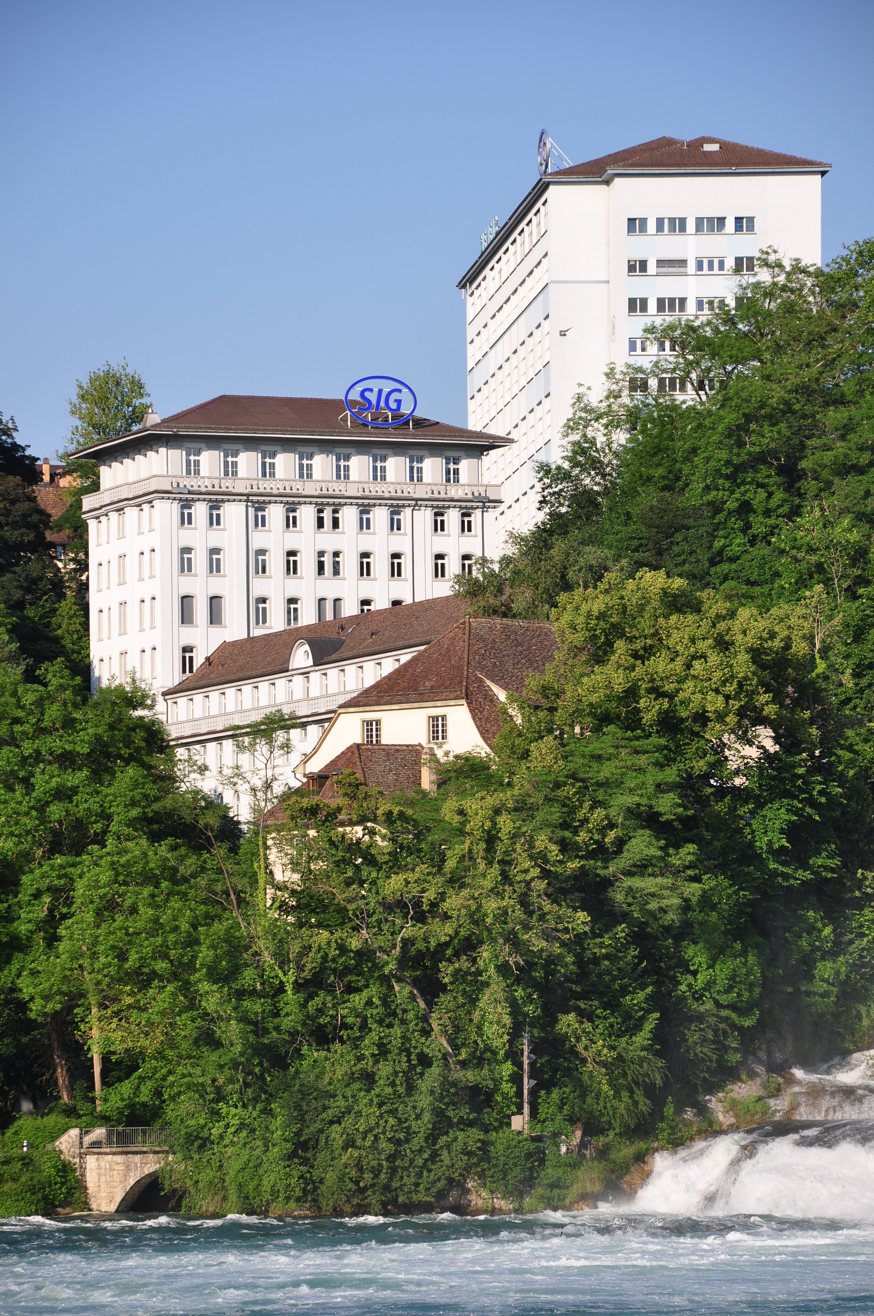 SIG building in Neuhausen am Rheinfall (Switzerland)